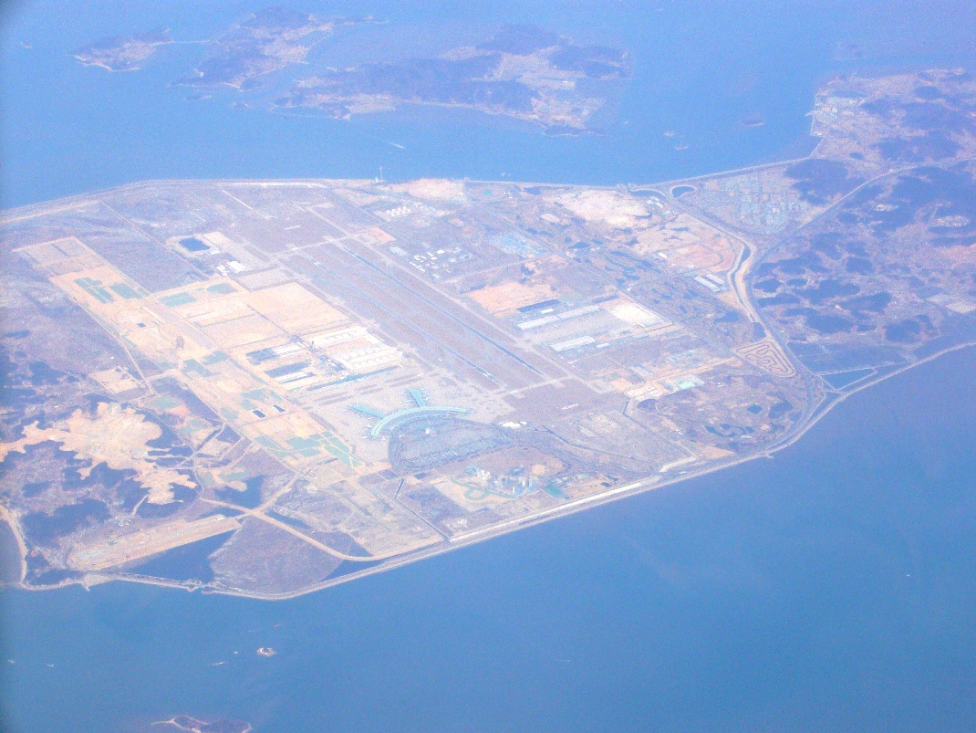 大韓民国・仁川広域市の仁川国際空港を空から望む。ターミナルビルの東側（右側）の2本の滑走路が供用中だが、西側にも滑走路用地が確保済みである。2006年3月26日に北京に向かう中国国際航空機の機内から投稿者が撮影。なお、少し黄砂気味の霞んだ展望であったためにコントラストを調整した。